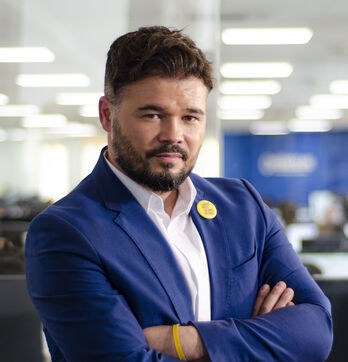 Gabriel Rufián en septiembre de 2019 para una entrevista del periódico eldiario.es, como diputado de ERC-Sobiranistes.